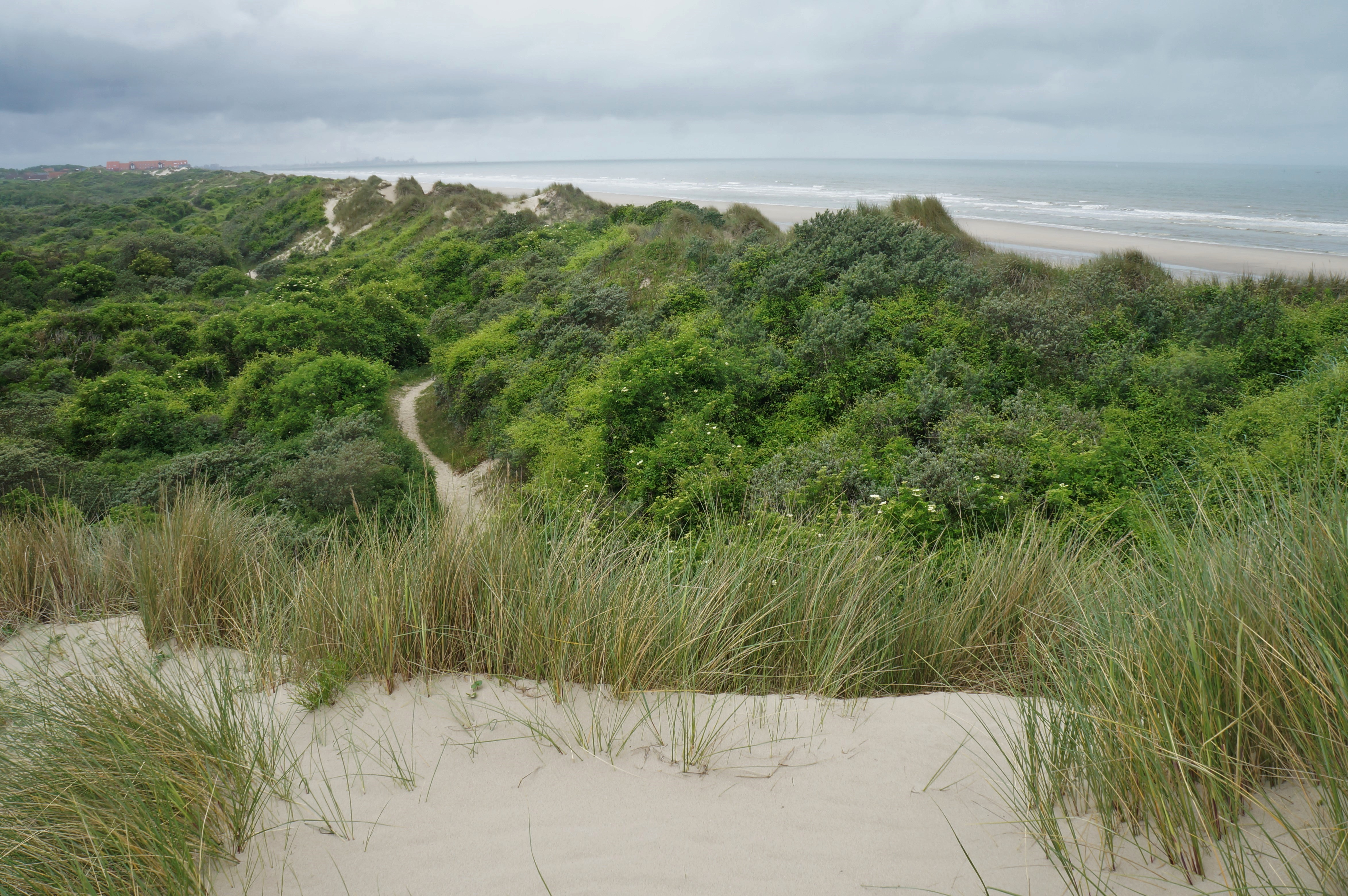 Vue sur la plage de Zuytcoote de la RNN de la dune Marchand Dunes de Flandres Nord-Pas-de-Calais-Picardie.- France